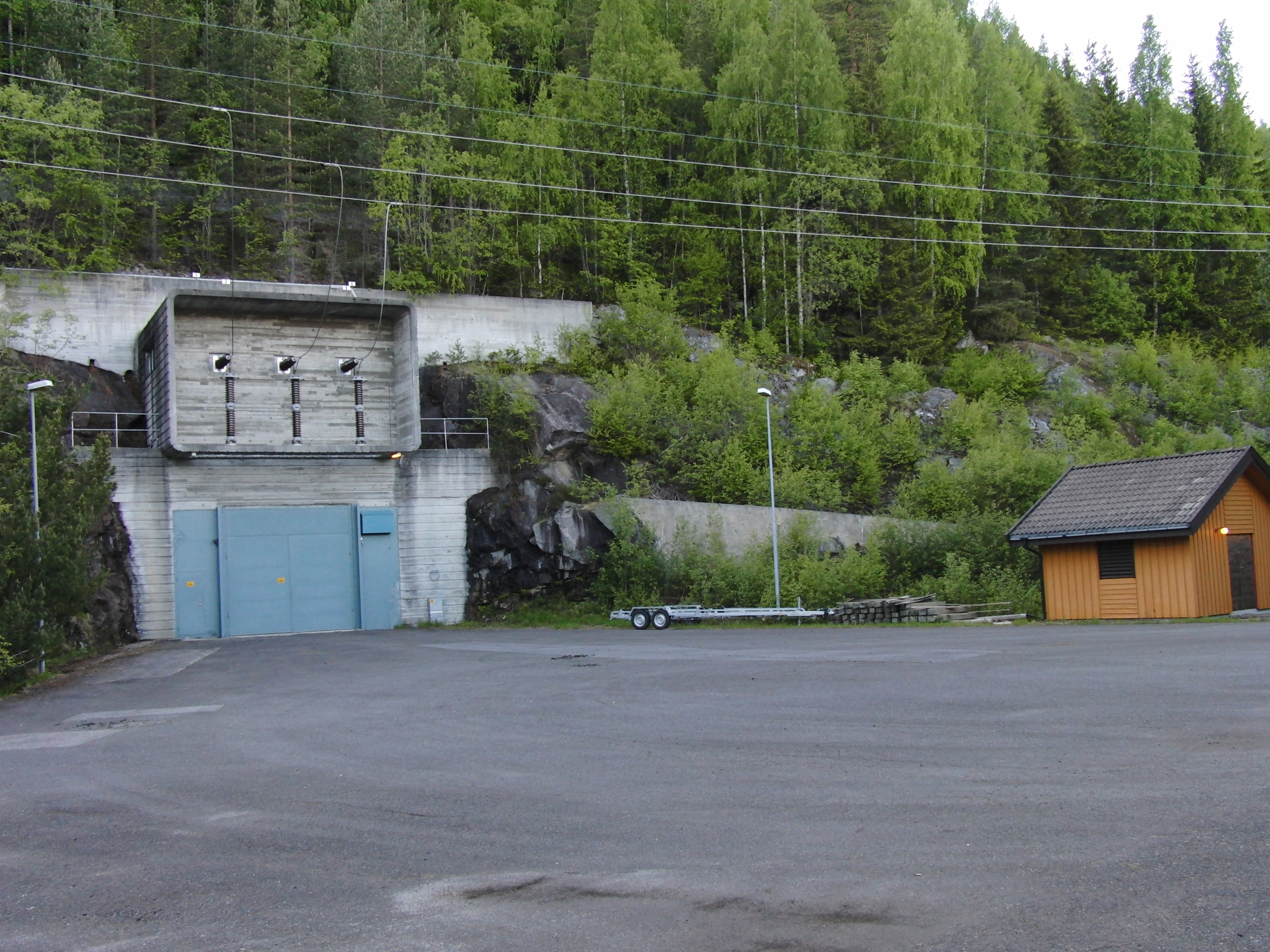 Finndøla kraftstasjon